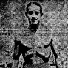 Ο Τάκης Προβατόπουλος, κολυμβητής και υδατοσφαιριστής του Ολυμπιακού και της Εθνικής Ελλάδας